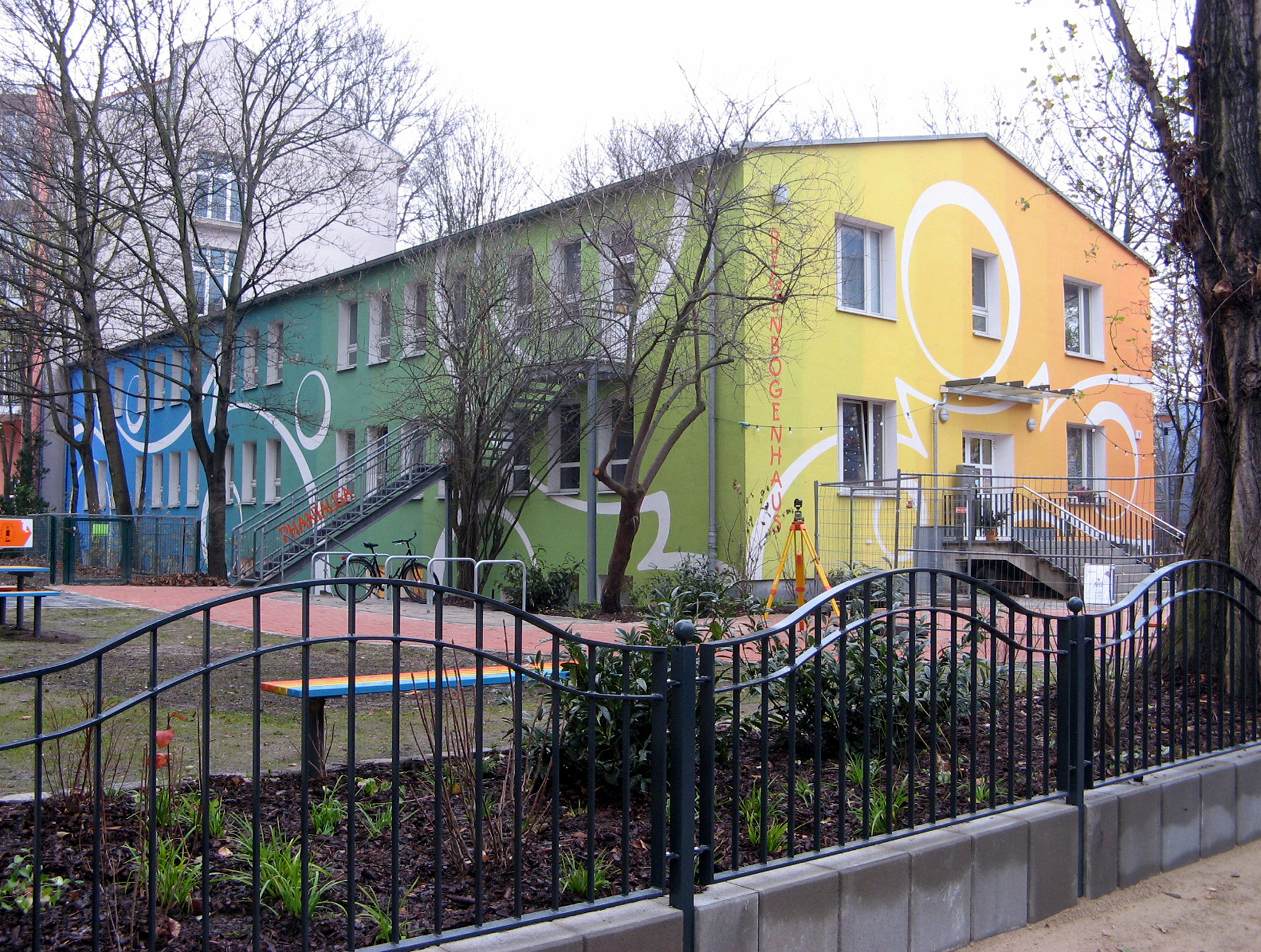 Ost- und Südfassade des Regenbogenhauses (Kadiner Straße 9), errichtet 1959-1961. Im Rahmen der Umgestaltung 2005-2009 wurde 2006 die Fassade durch den Künstler Torsten Brill neu bemalt. Beginnend mit Rot am westlichen Ende der Nordfassade und endend mit Blau am westlichen Ende der Südfassade wurden umlaufend die Regenbogenfarben großflächig aufgetragen. Schwungvolle Bögen und Kreise darauf gliedern die Fassade und vermitteln Dynamik.